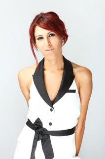 Portrait de la journaliste et militante féministe marocaine Fedwa Misk .